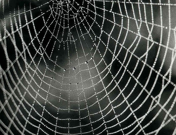 Mit Tau benetztes Radnetz einer Gartenkreuzspinne